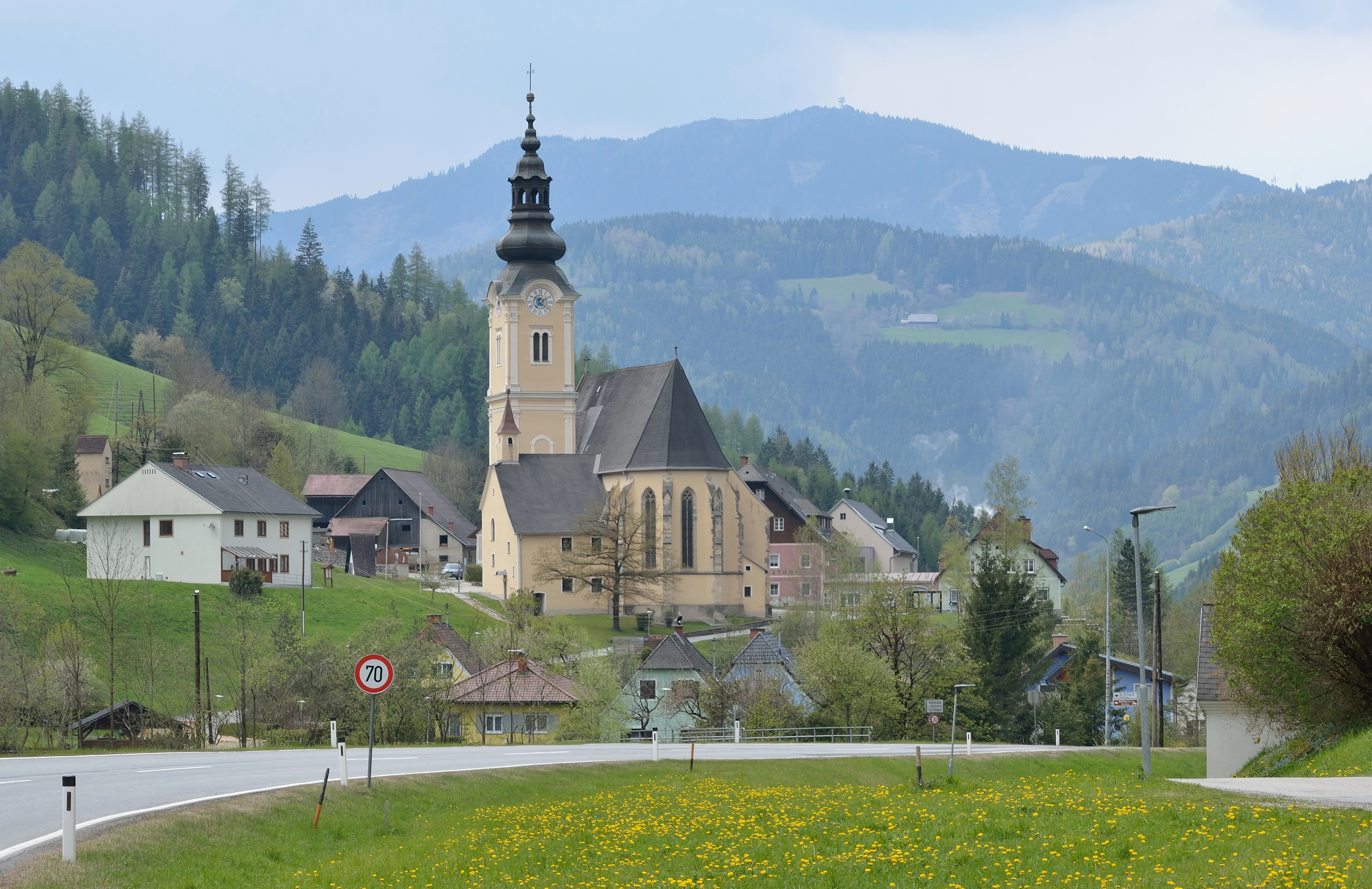 Die Pfarr- & Wallfahrtskirche St. Erhard in Sankt Erhard in der Breitenau, Gemeinde Breitenau am Hochlantsch, steht unter Denkmalschutz.